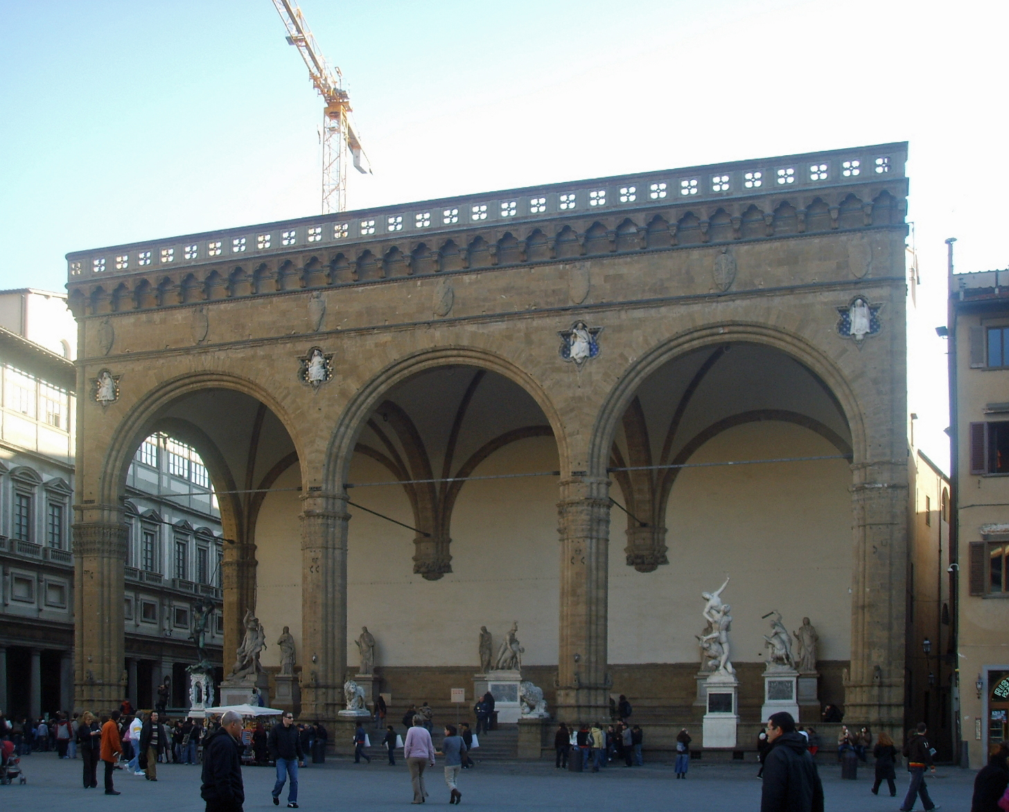 Loggia dei Lanzi in Florence. 1870s. 1870s. 1870s Today.